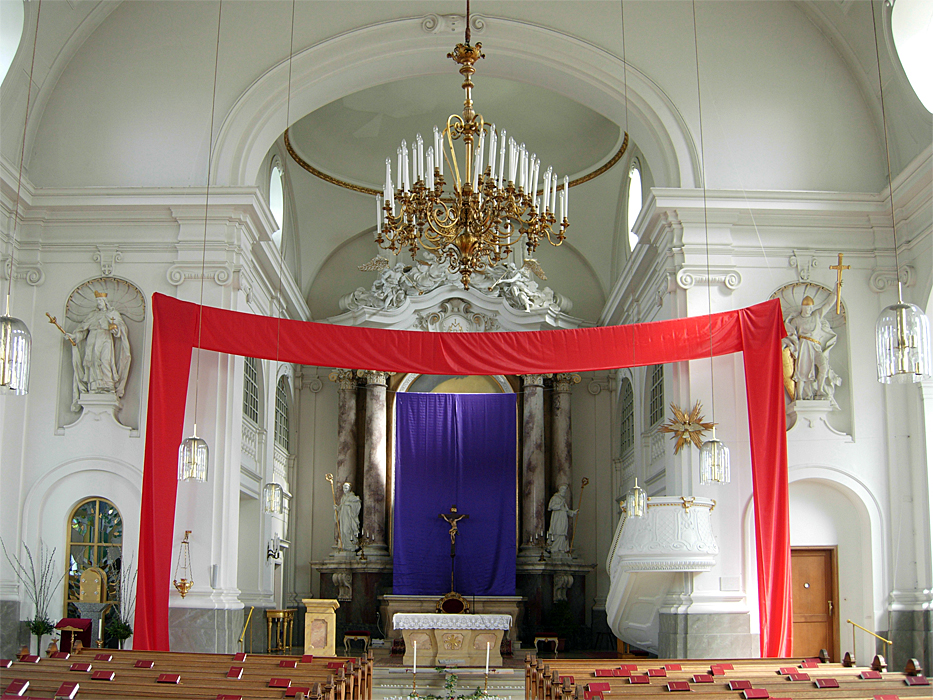 Kaasgrabenkirche Maria Schmerzen, Wien